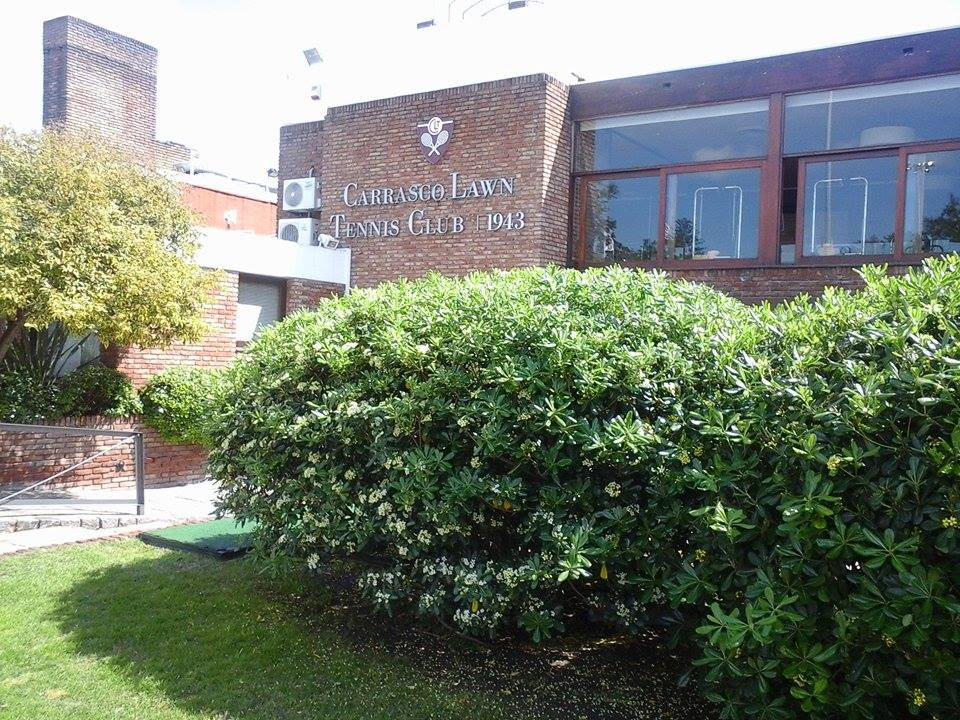 Entrada al club Carrasco Lawn Tennis en donde se encuentran las diferentes salas.